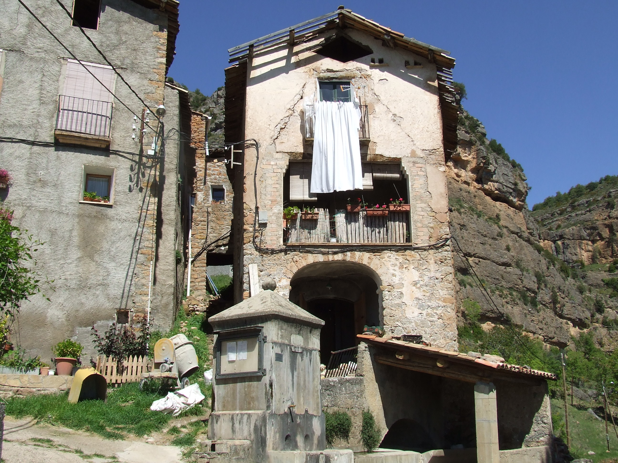 Cal Servent i la font pública de Gurp (Gurp de la Conca, Tremp, Pallars Jussà)